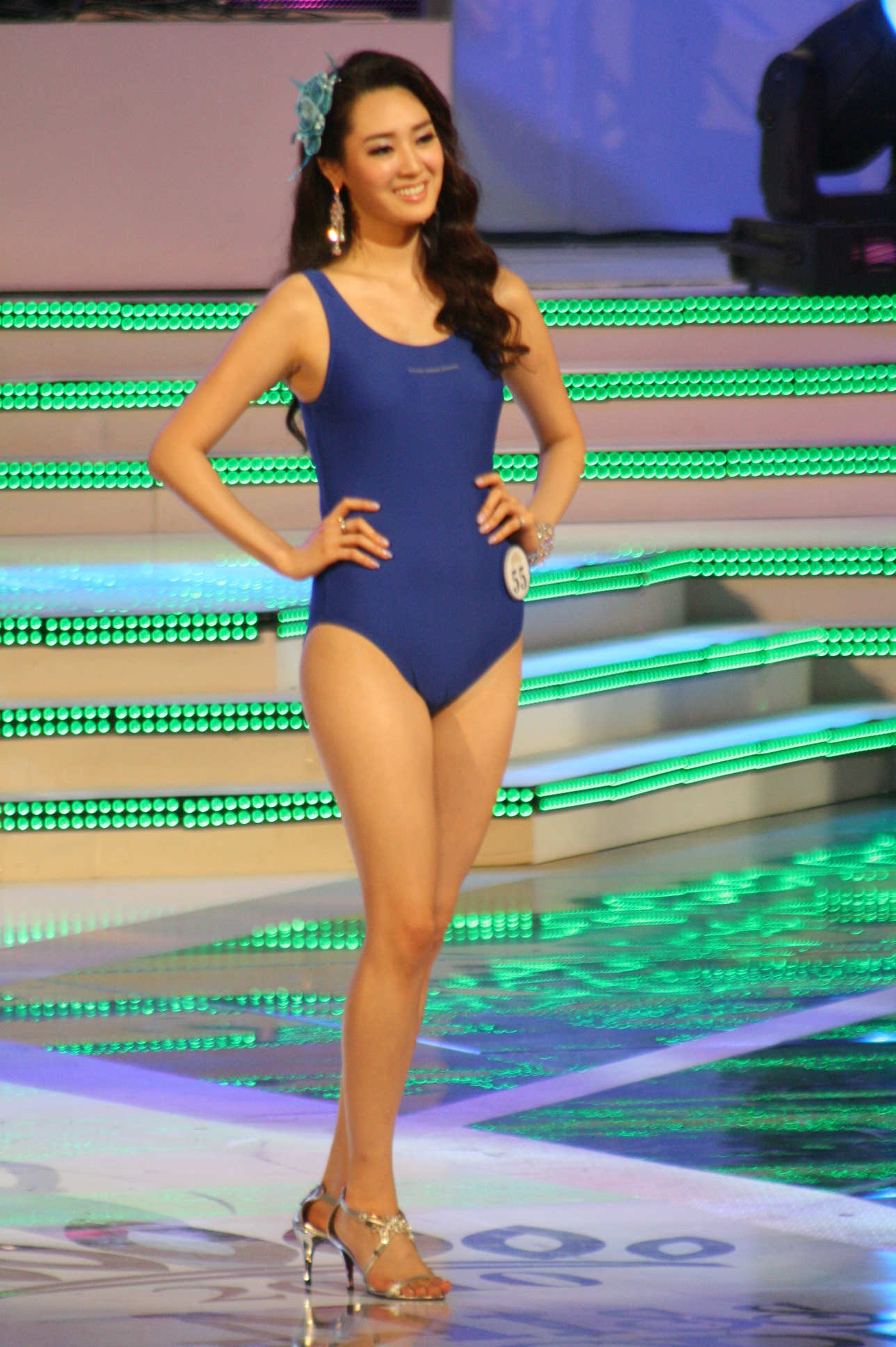 2010 미스코리아 진 정소라(서울 선) 수영복 심사